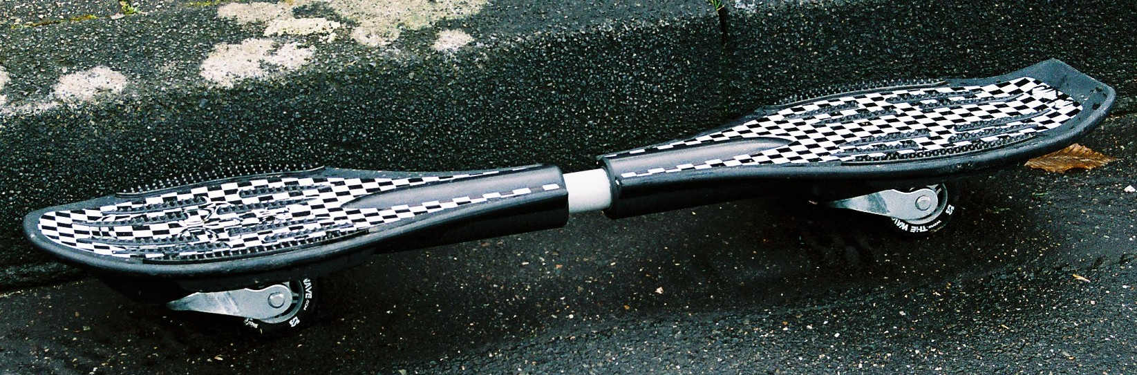 The Wave (Fahrtrichtung links)